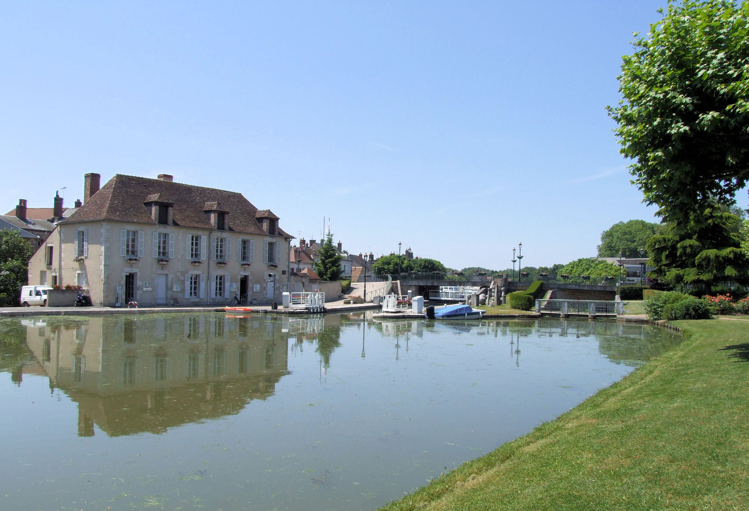 Canal de Briare - Le canal à Briare devant l'Office du tourisme